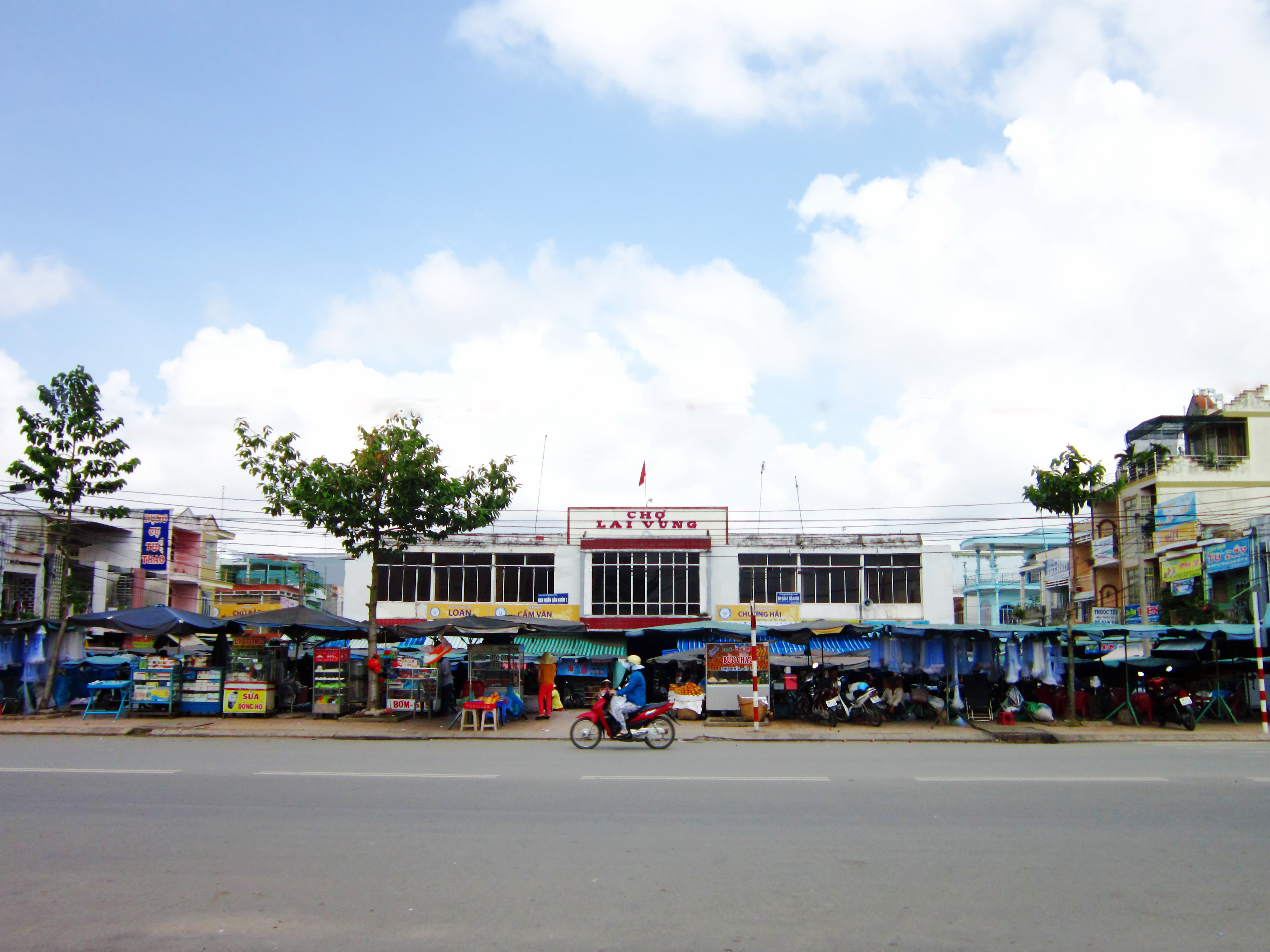 Chợ Lai Vung, thuộc huyện Lai Vung, tỉnh Đồng Tháp, Việt Nam.